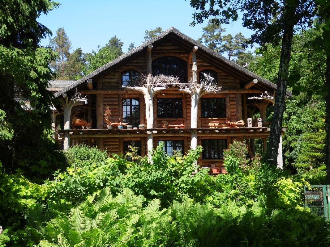 GALINDIA. HOTEL NA TERENIE OŚRODKA.